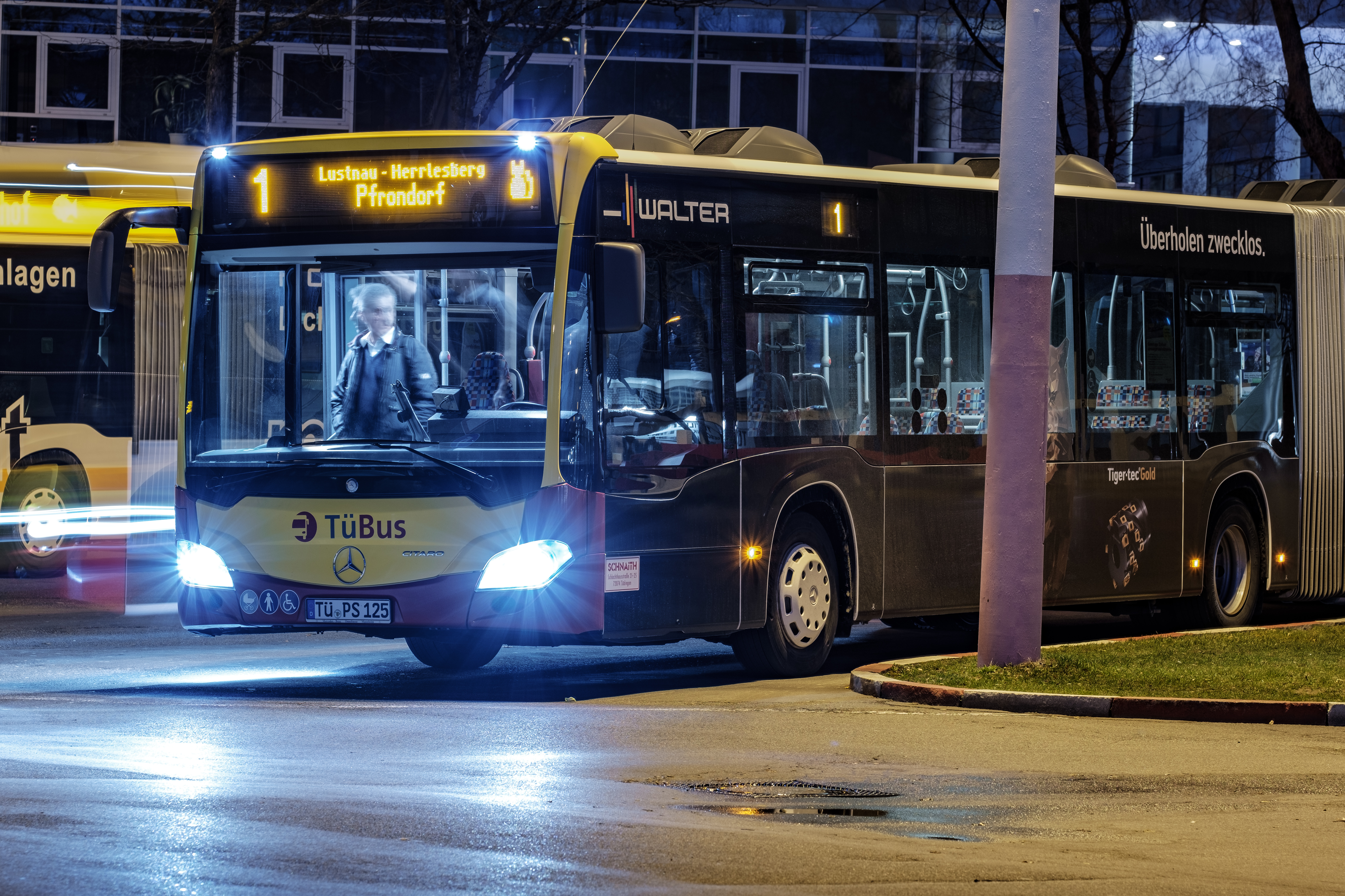 Buslinie 1 am Omnibusbahnhof in Tübingen bei Nacht